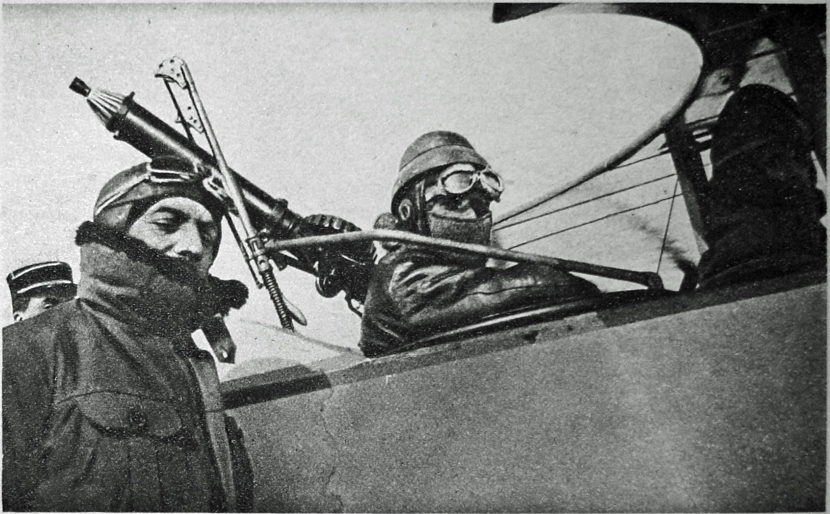 publié dans le magazine Le Miroir n°132 page 14